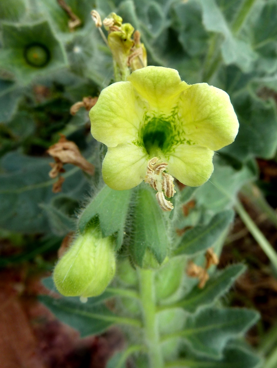 Hyoscyamus albus (Beleño) : flor y botones - Camino viejo/Cañada de Alicante, Albatera (Alicante, España).